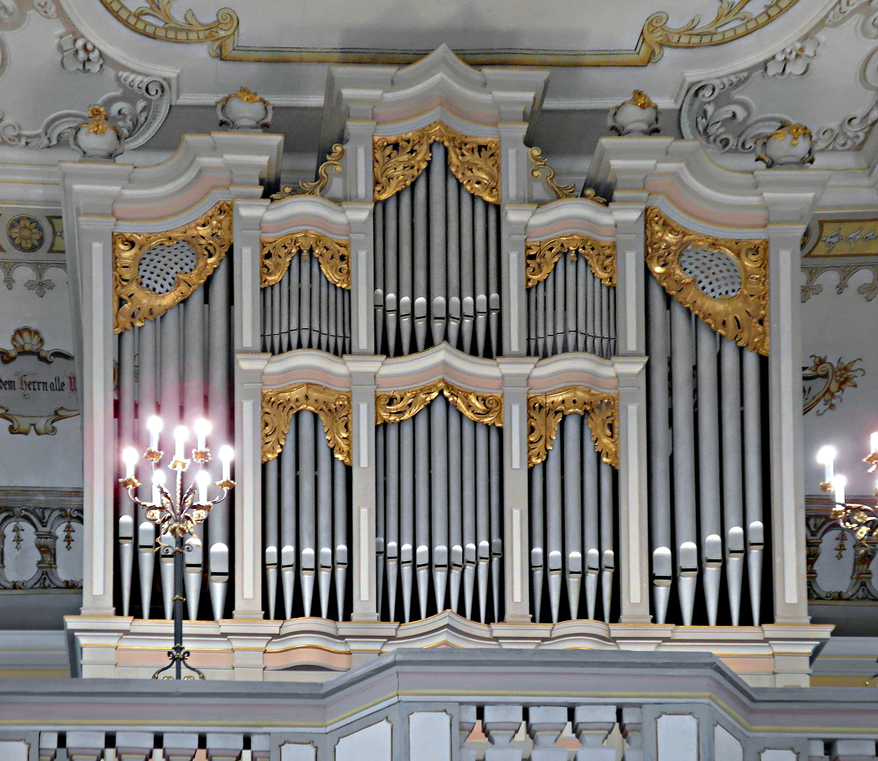 22.09.2018 01833 Stolpen: Ev.-Luth. Stadtkirche (GMP: 51.048311,14.082305), ursprünglich spätgotisch um 1490, im 18. und 19. Jahrhundert stark verändert. Orgel von Hermann Eule, Bautzen (1898) im barocken Gehäuse der Vorgängerorgel von Johann Christian Pfennig (1766) aus Kröbeln. [SAM7772.JPG]20180922495DR.JPG(c)Blobelt